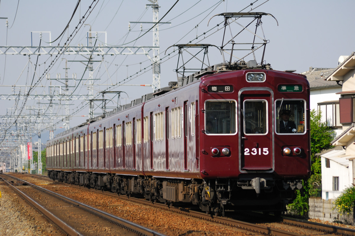 阪急2300系 2313F 茨木～南茨木間にて 2007年4月 投稿者が撮影